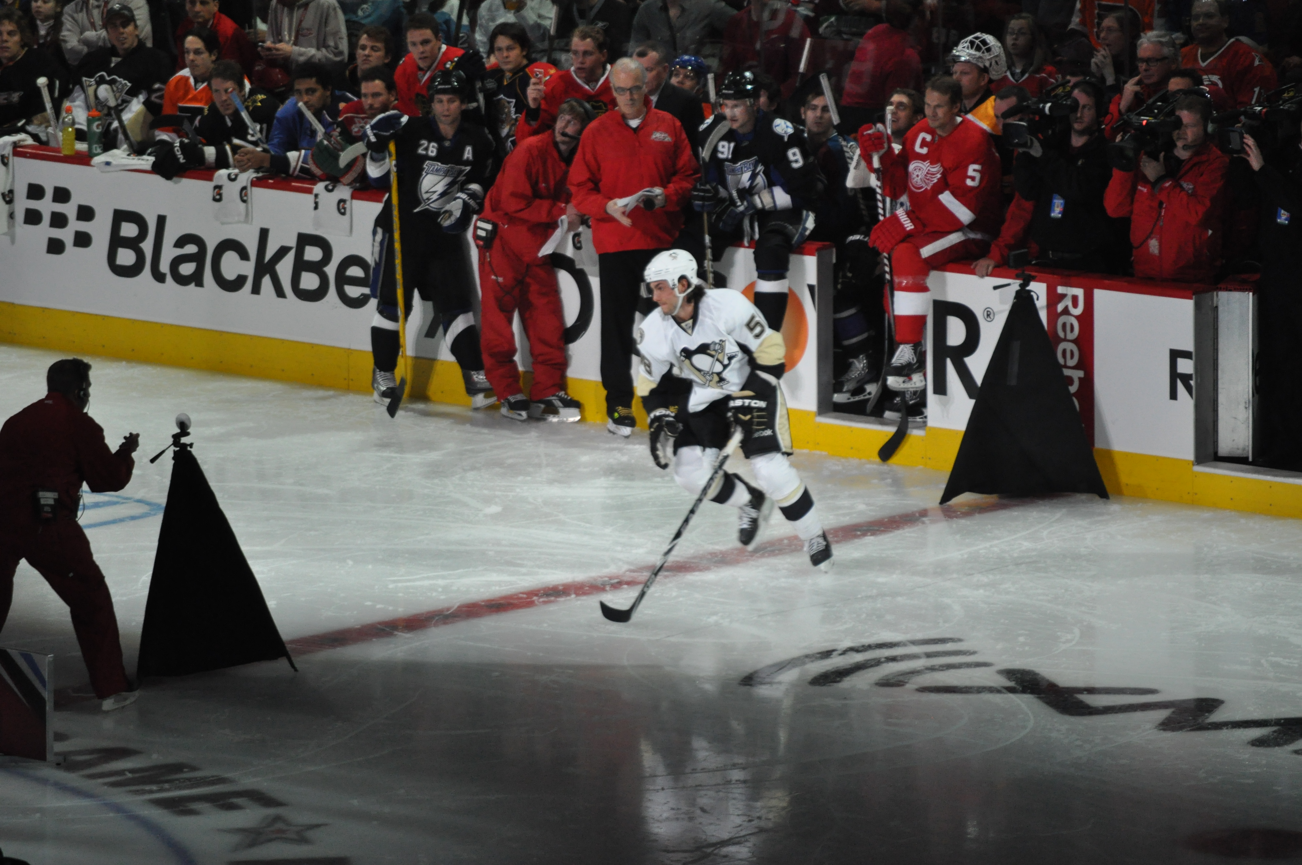 Fastest Skater